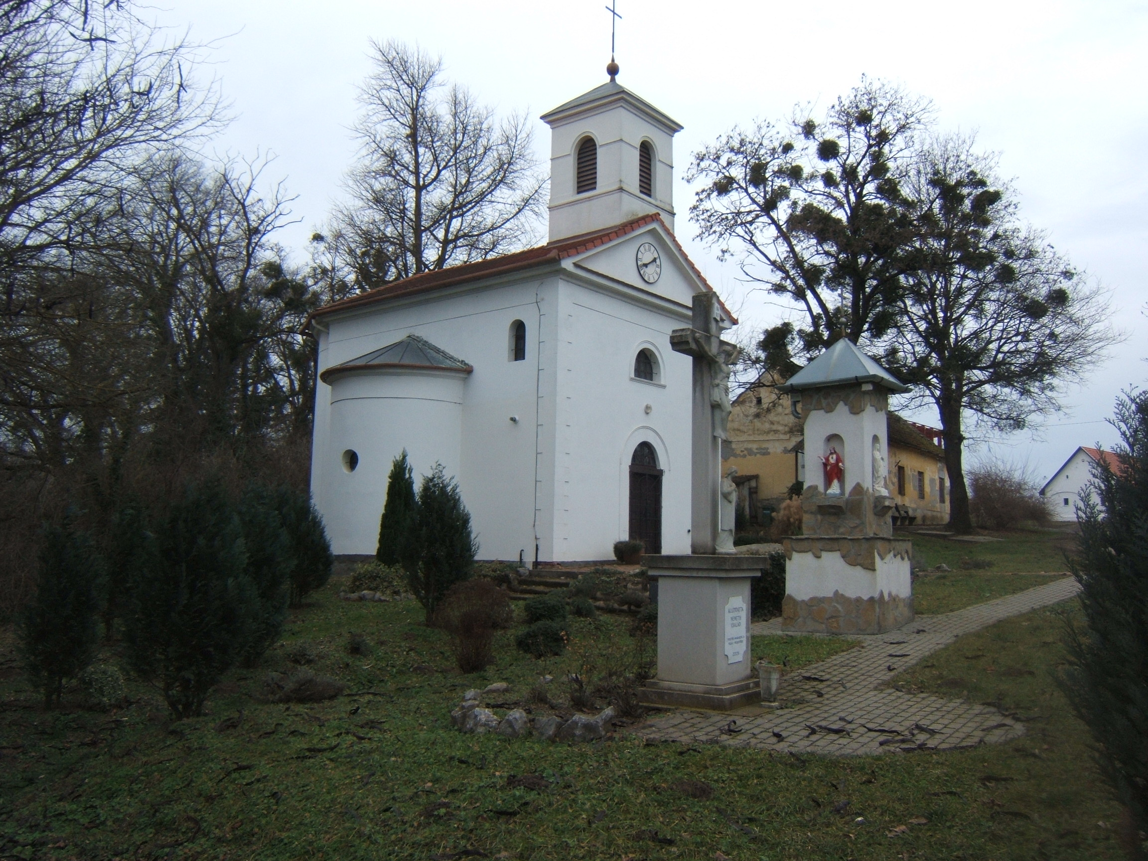 Alsóbogát, kápolna